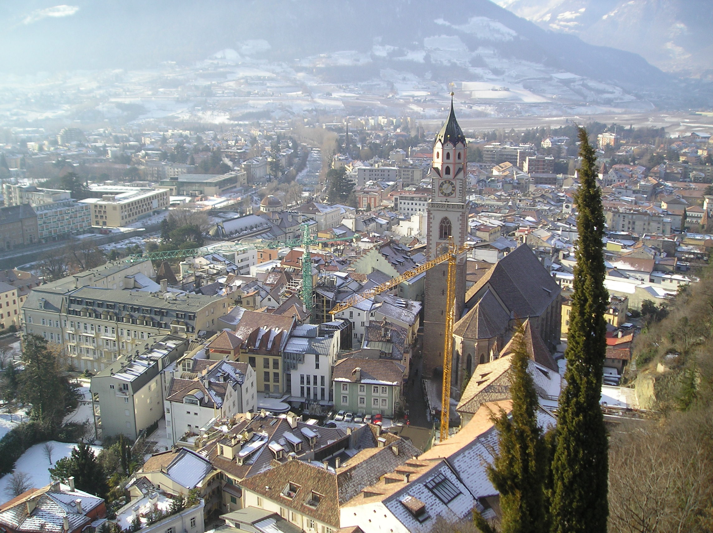 Questa foto rappresenta una vista di Merano dalla Torre delle Polveri, è stata scattata da me, G. Salluzzi a dicembre 2005 ed è rilasciata in Pubblico Dominio